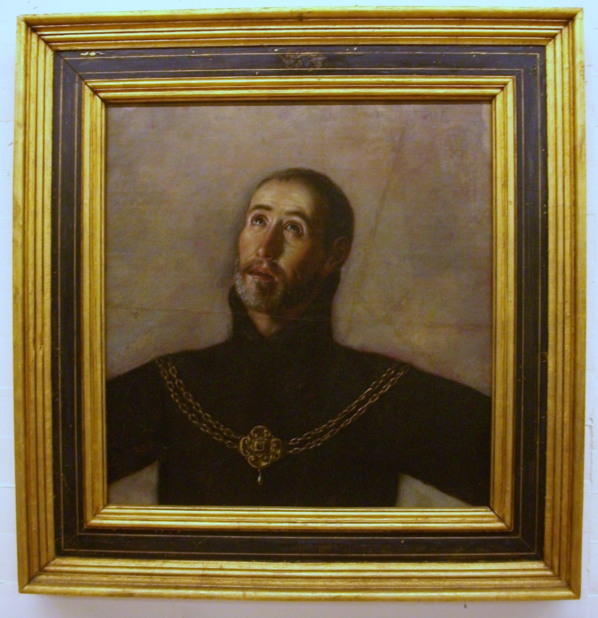 Sant Gaietà, Urbà Fos (1615-1658). Oli sobre llenç, 58 x 55 cm, Museu de Belles Arts de Castelló.